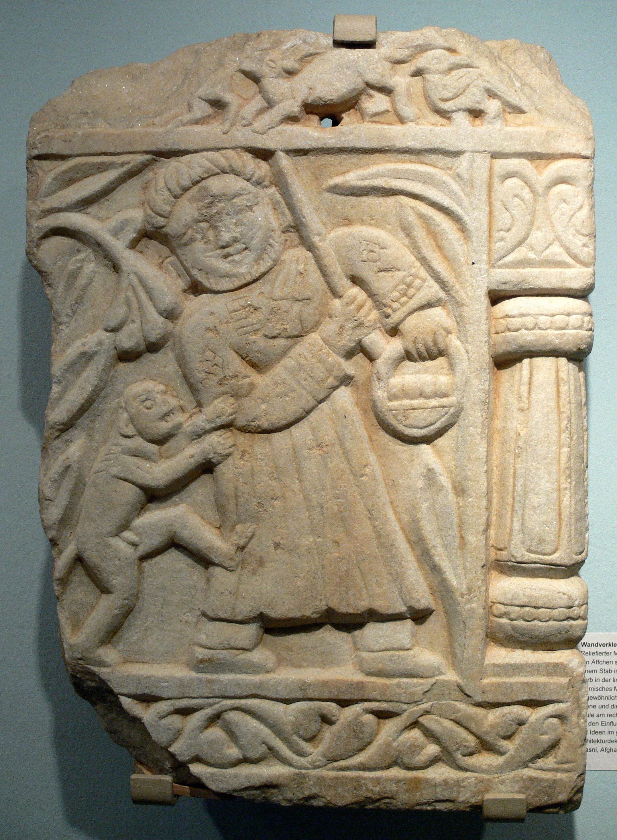 Wandverkleidung (Äffchen mit Mann), Marmor, aus Ghasni, Afghanistan, Anfang 12. Jh. Linden-Museum, Stuttgart